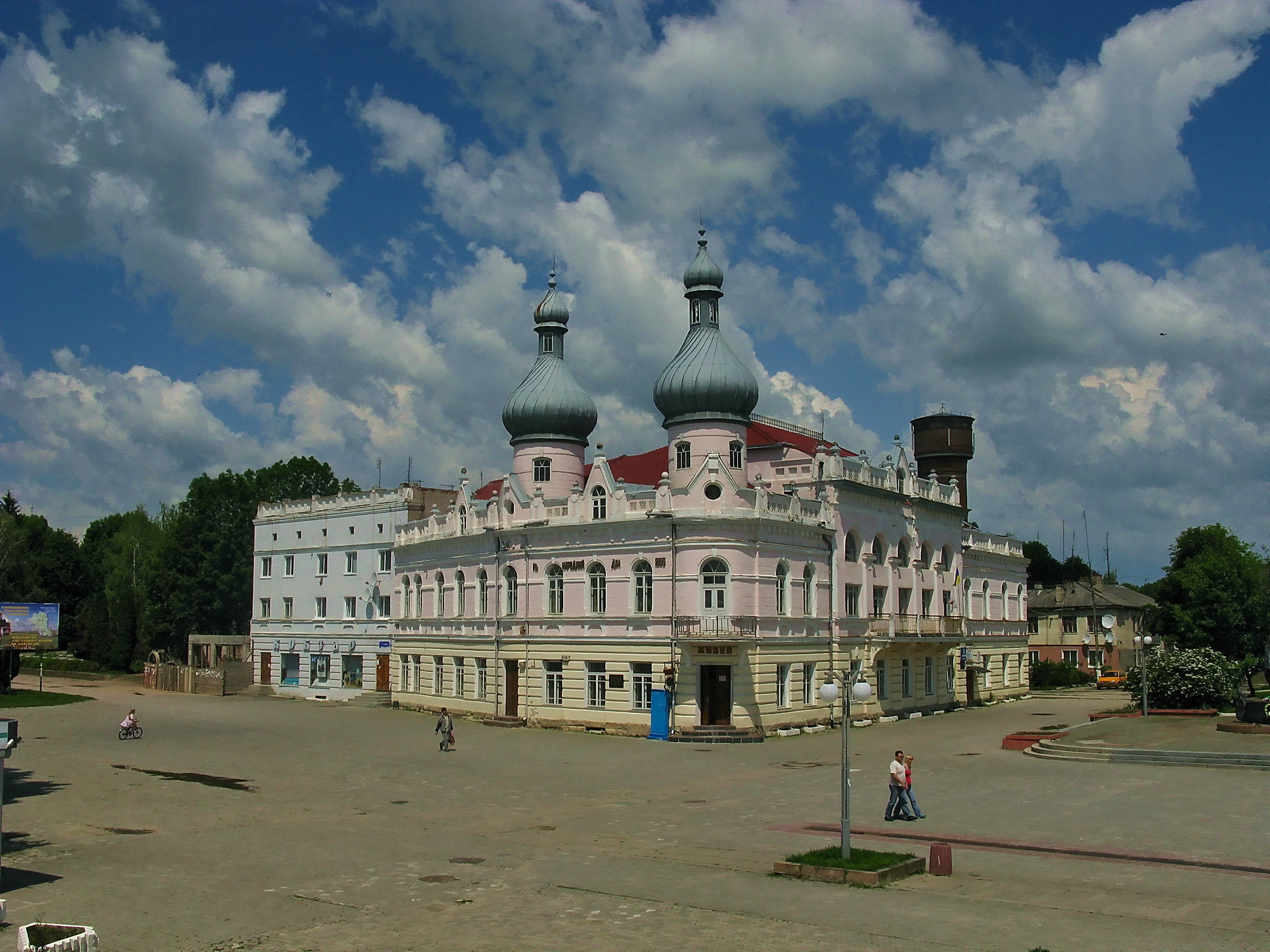 Народний будинок (мур.), Борщів, вул. Шевченка, 2, Тернопільська область